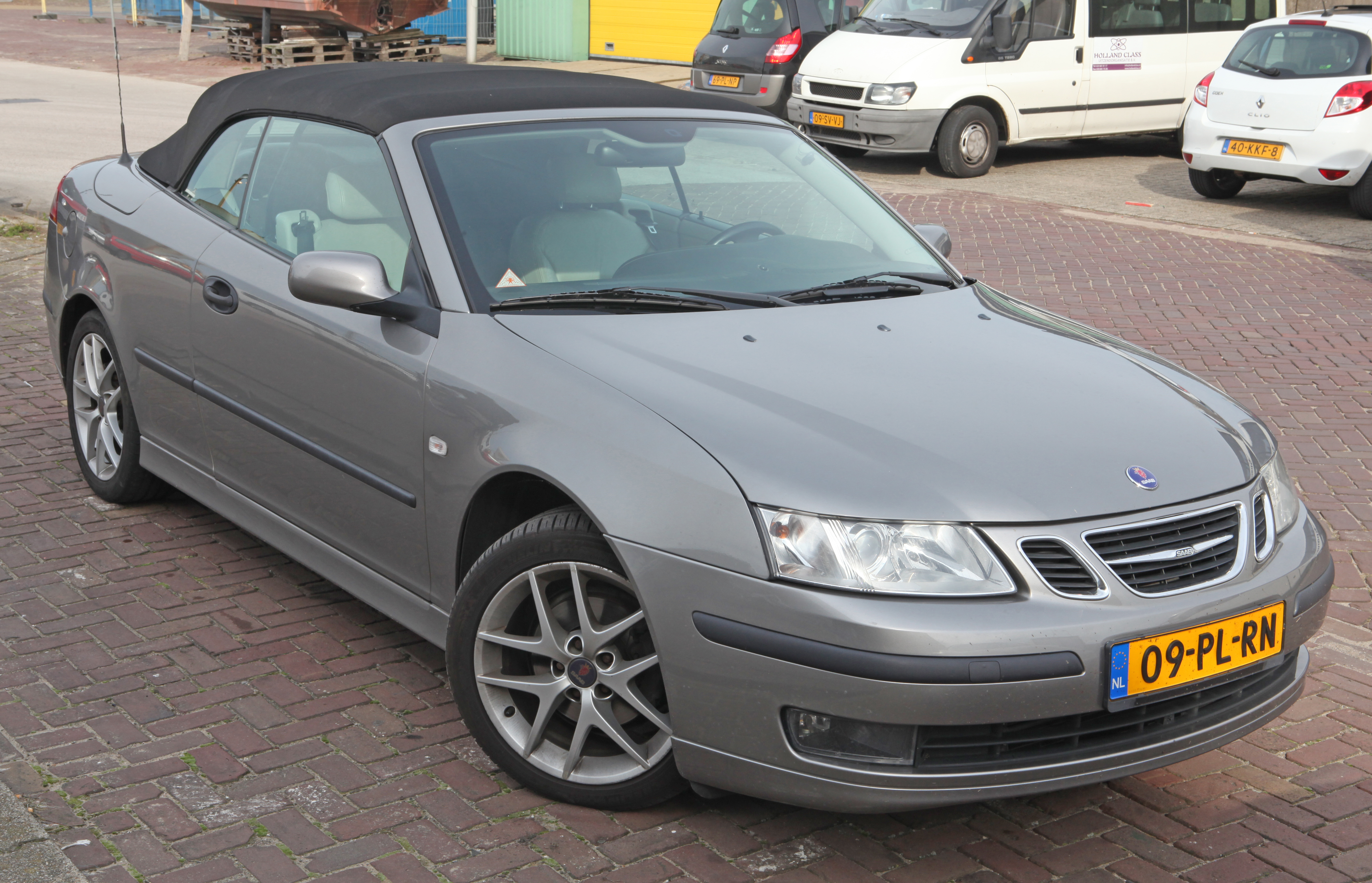 2004 Saab 9.3 2.0 T cabriolet Automatic